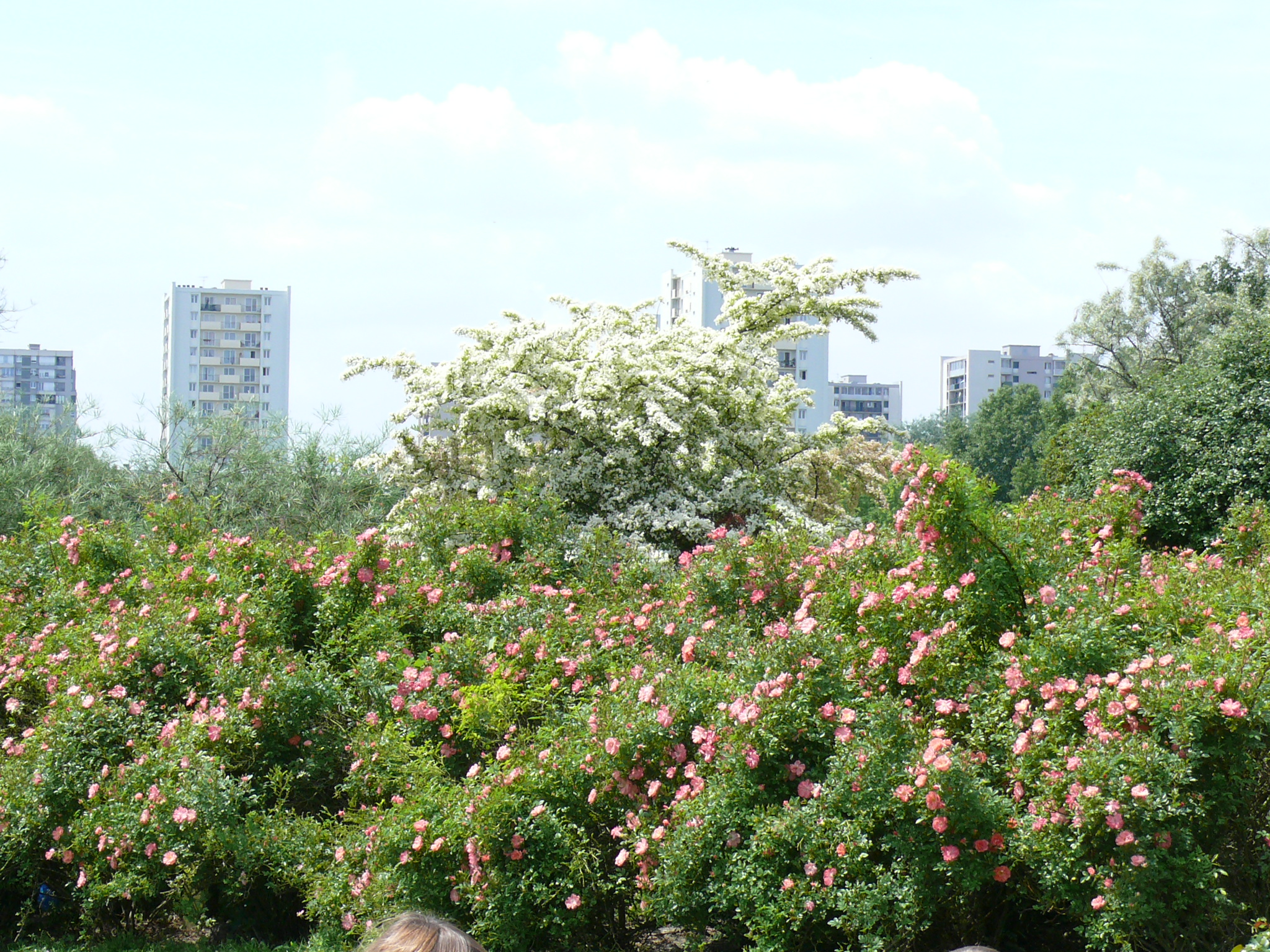 Parc départemental de La Courneuve (Seine-Saint-Denis - Île-de-France - France) - Le parc voisine des grands ensembles, ici de Saint-Denis